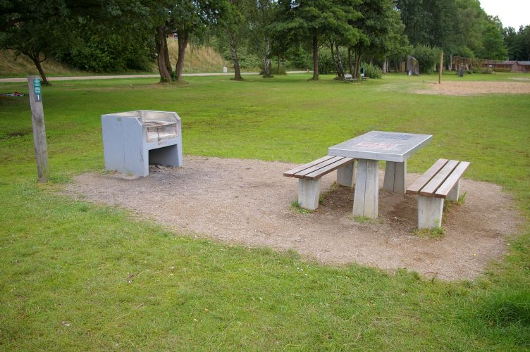 Öffentlicher Grillplatz